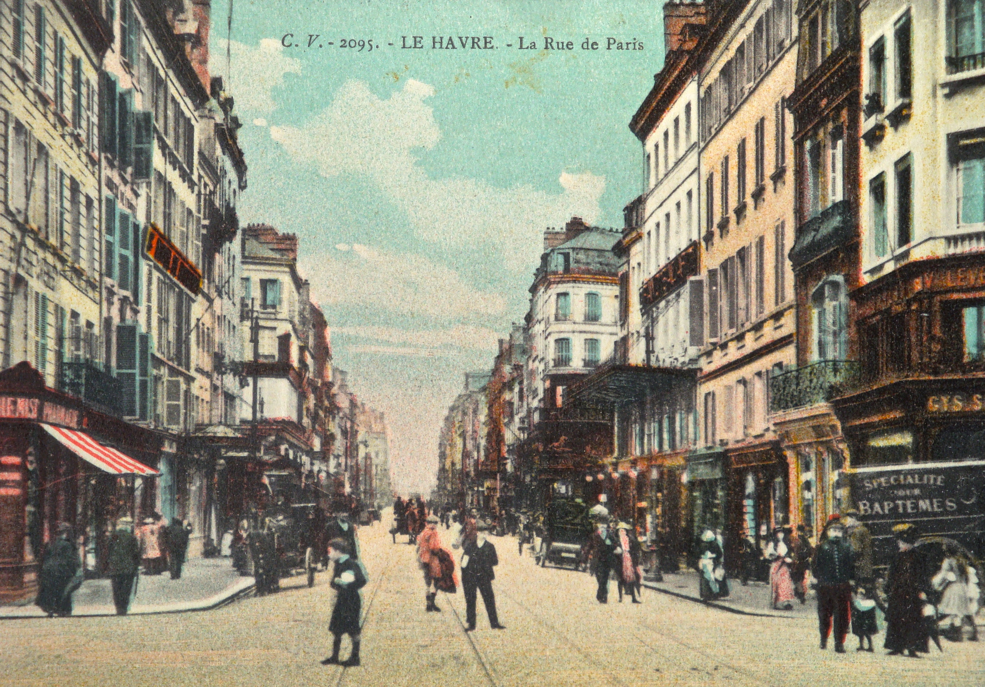 Vue de la rue de Paris au Havre en 1910. Photographie anonyme noir et blanc coloriée